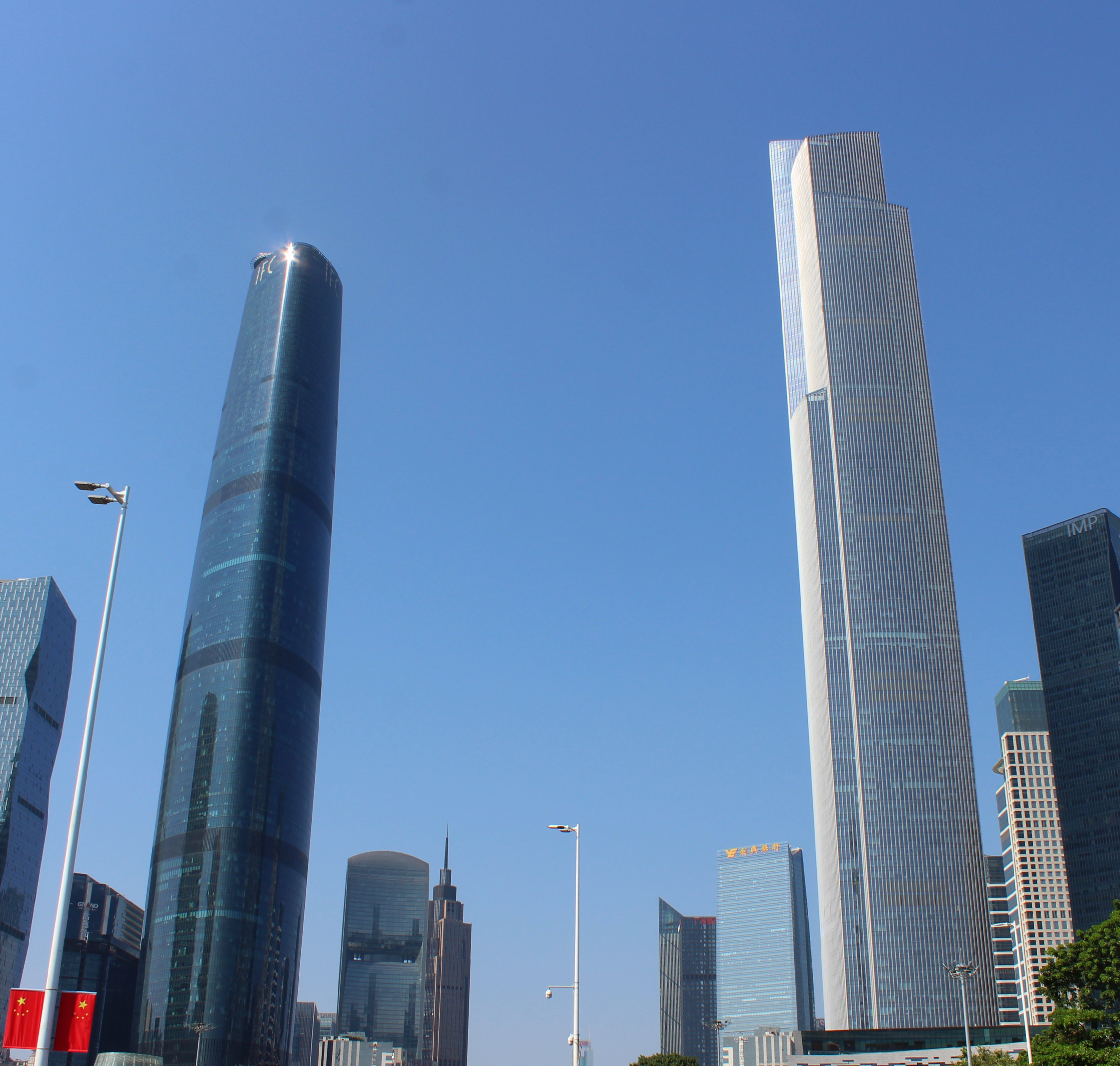 Guangzhou IFC (left) and Guangzhou CTF (right). They were initially designed to be twins, but destiny decided otherwise... Guangdong Province, China